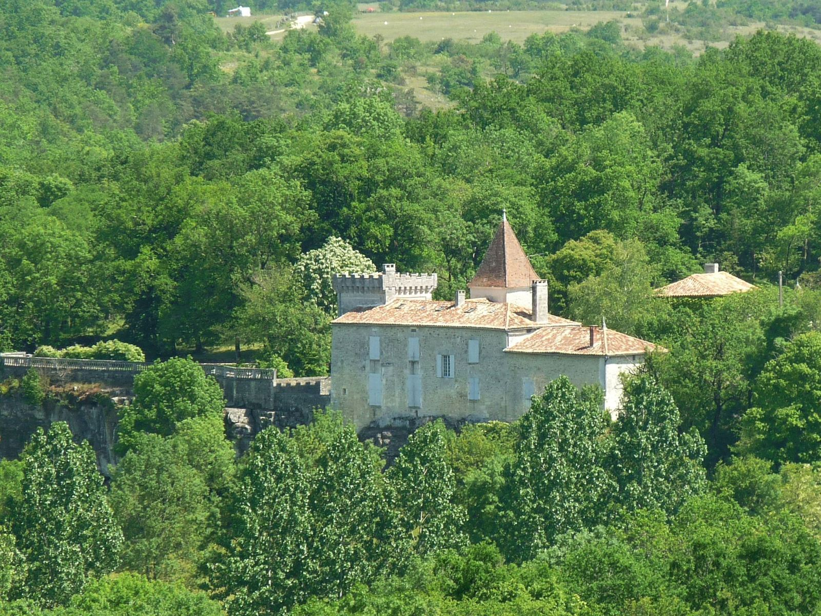 les Fieux (La Rochebeaucourt, Dordogne), vus de la falaise d'Edon, Charente, France